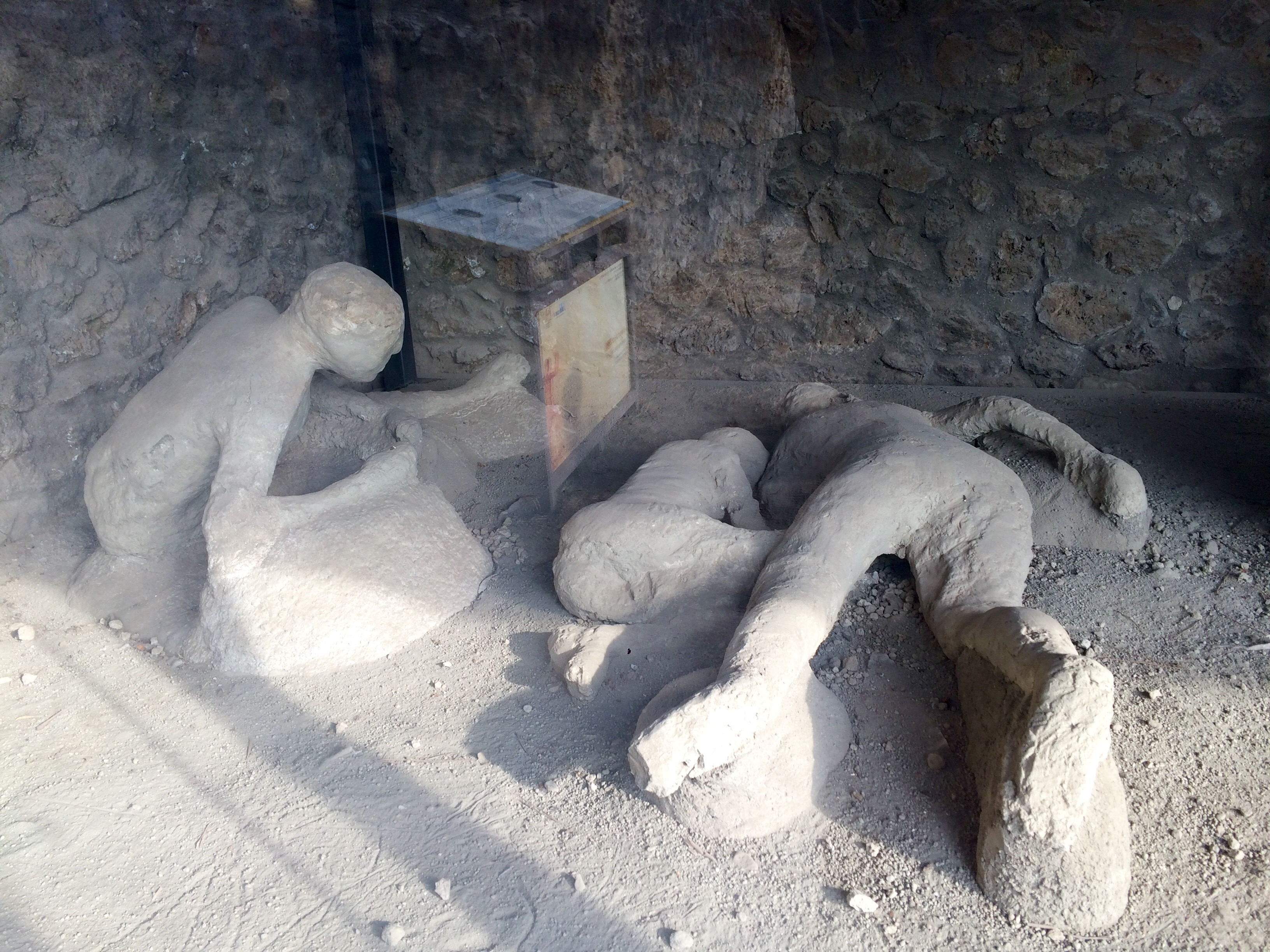 Pompei